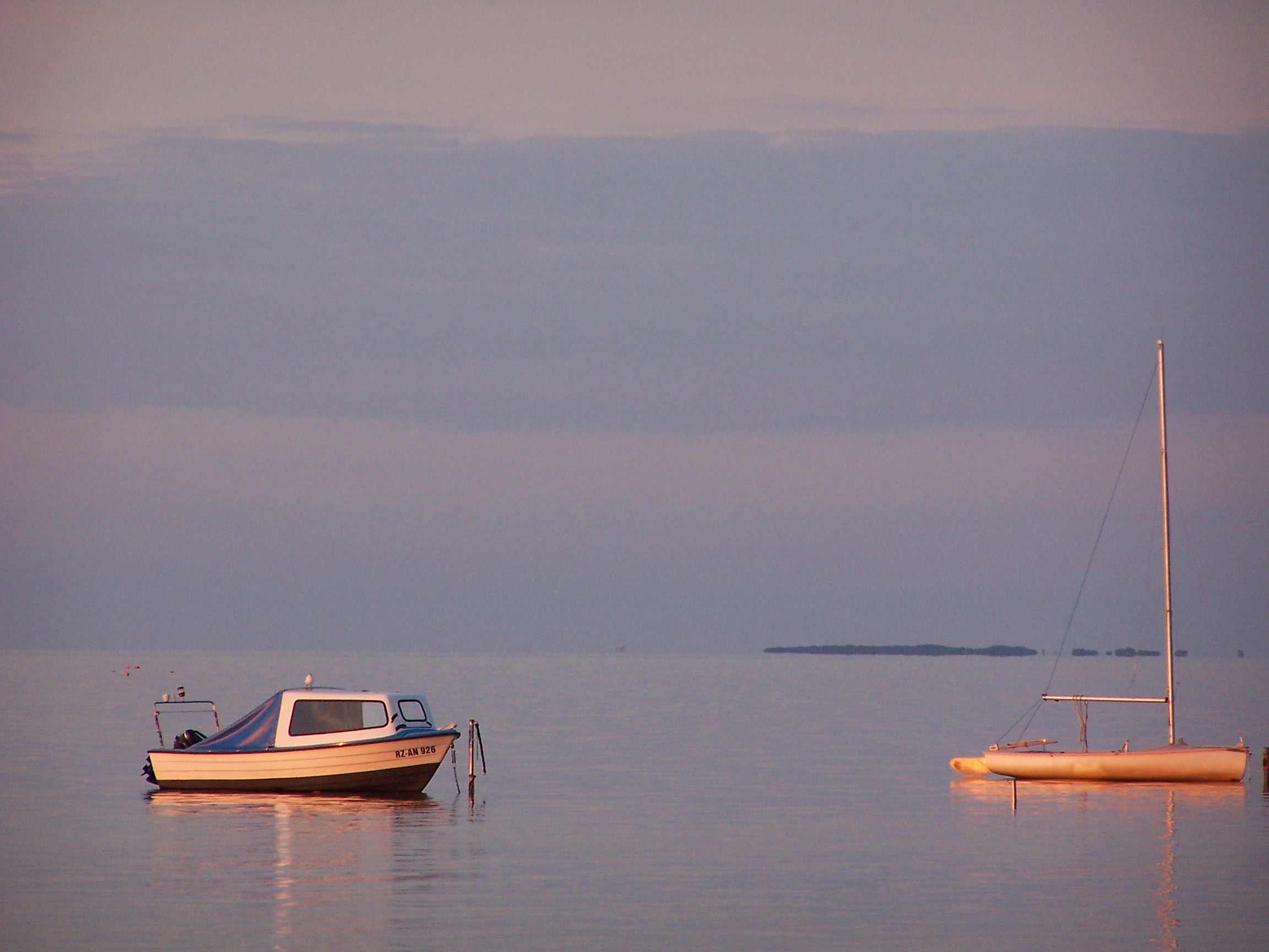 Greifswalder Bodden durig sunset